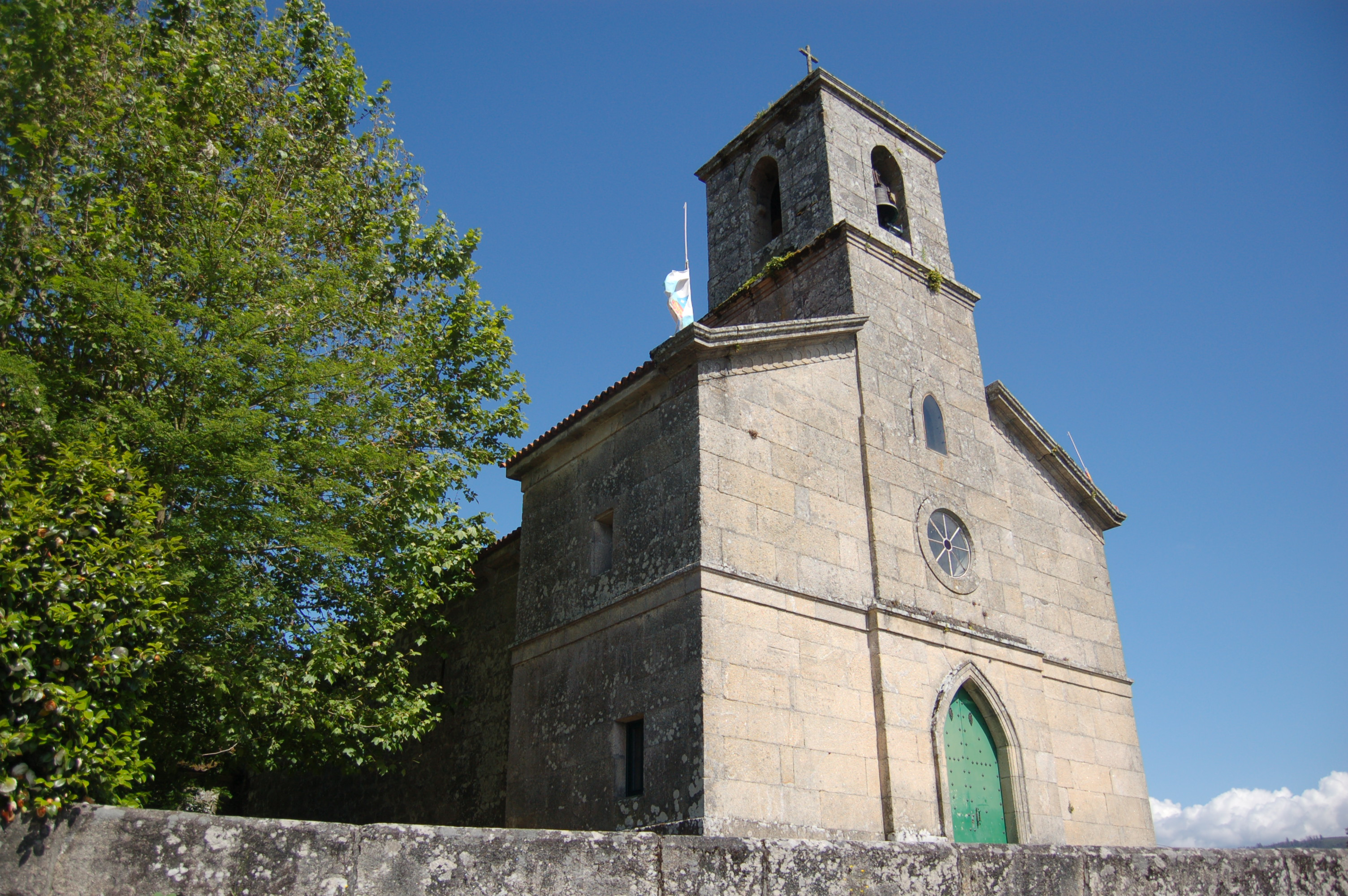 Igrexa parroquial de Santa María de Ponte Sampaio (Pontevedra)